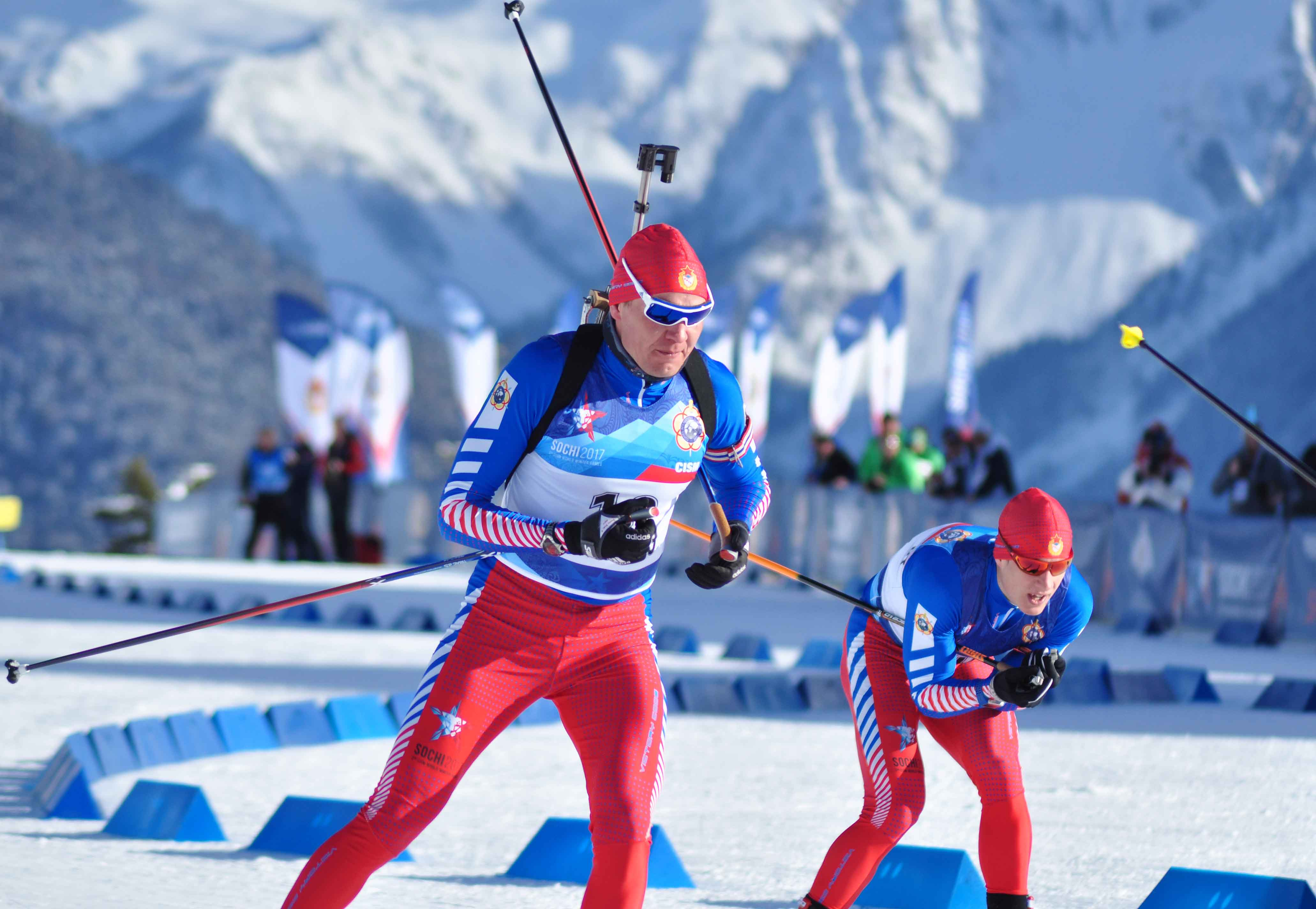 третьи зимние Всемирные военные игры, разное